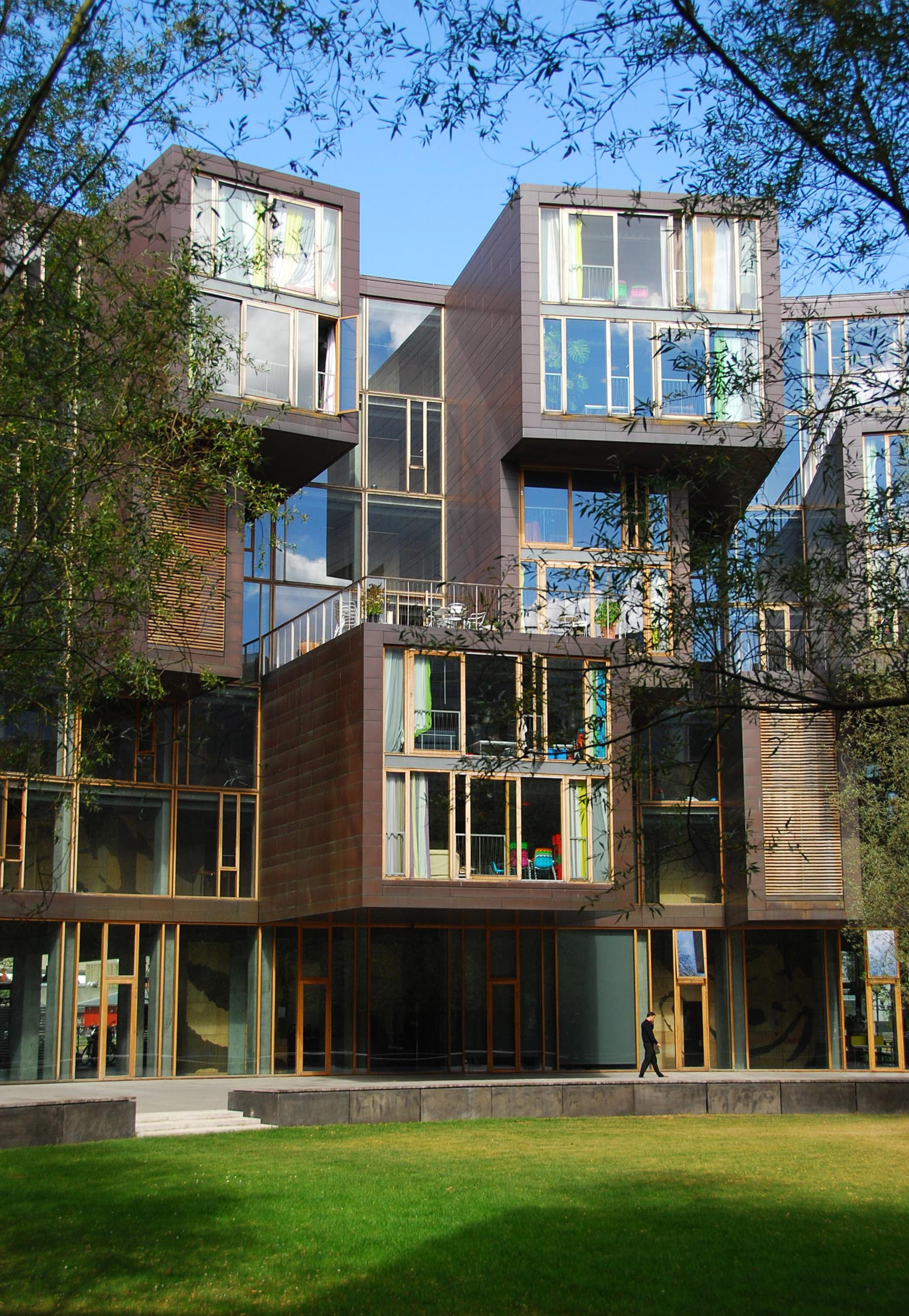 The courtyard of Tietgenkollegiet in Copenhagen, Denmark